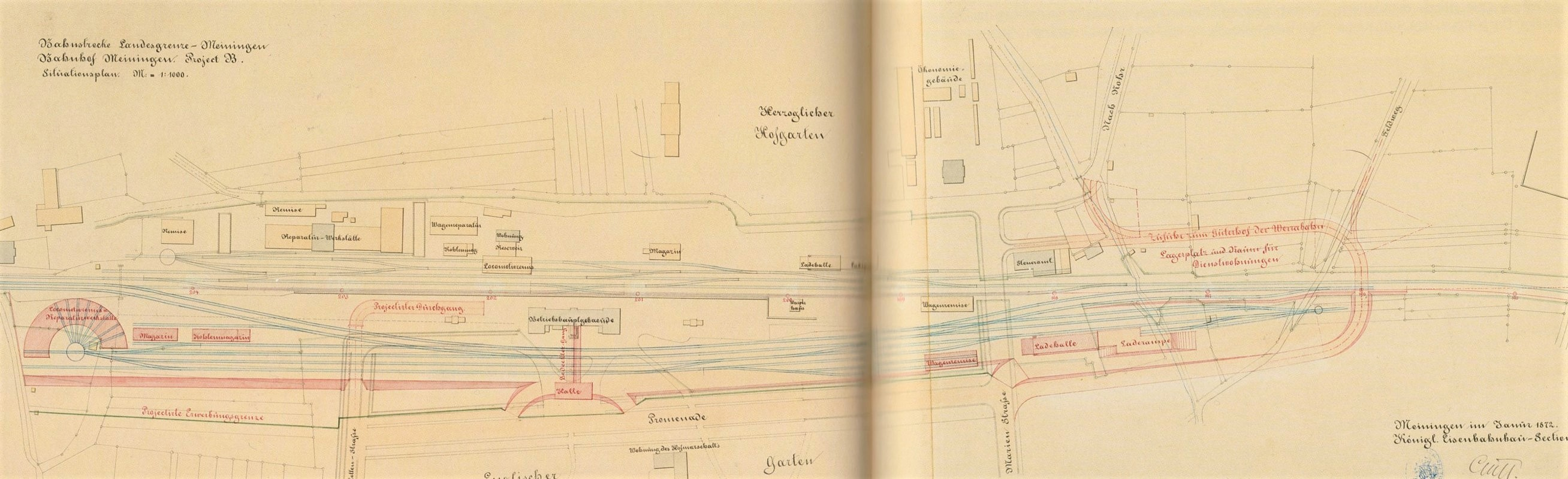 Bahnhof in Meiningen, nicht realisierter Erweiterungsplan für den Bayerischen Bahnhof von 1872, dessen Gleise im unteren Teil des Bahngeländes mit Halle verlegt werden sollte. Es wurde später ein anderer Plan realisiert.